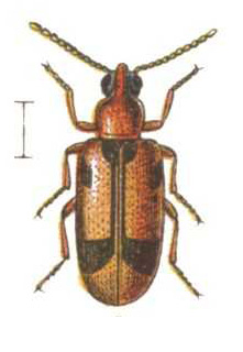 Notoxus monoceros (Linnaeus, 1760)